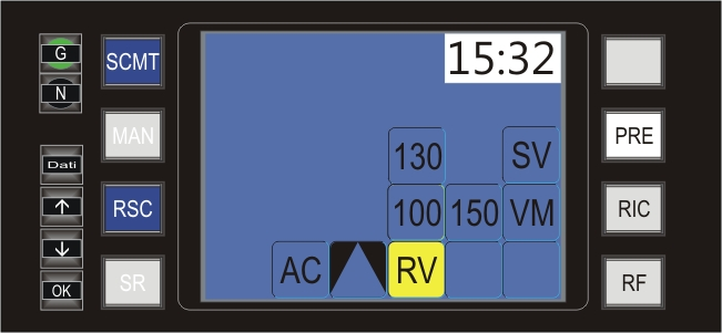 Sicurezza e Segnalamento